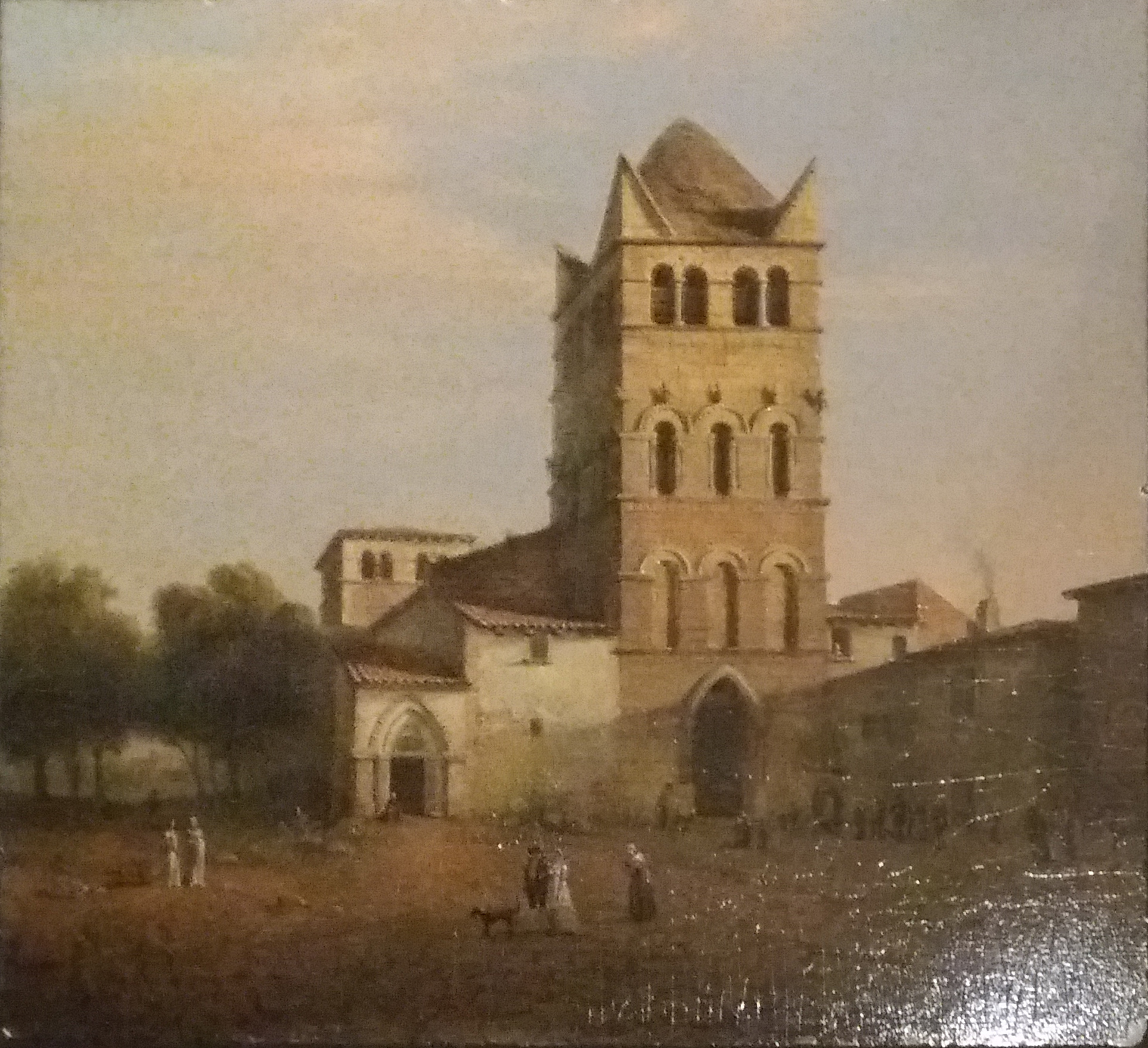 Jean-Michel Grobon (Français, 1770-1853): Saint-Martin d'Ainay